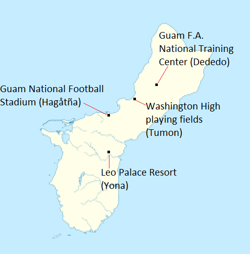 Stades où la sélection de Guam de football a au moins disputé un match.